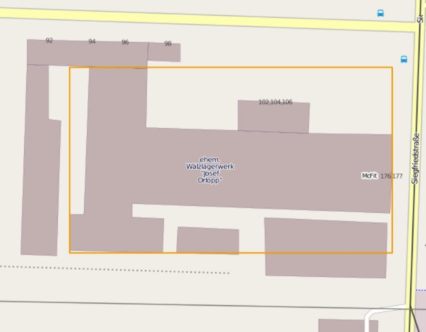 Gebäudegrundrisse der eh. Wälzlagerfabrik in Berlin-Lichtenberg